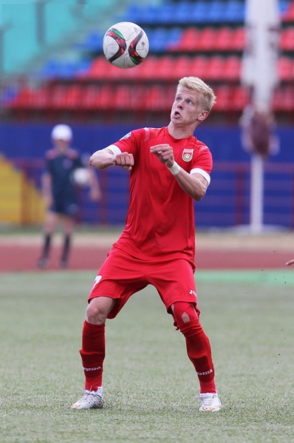 Алекса́ндр Влади́мирович Зи́нченко — украинский футболист